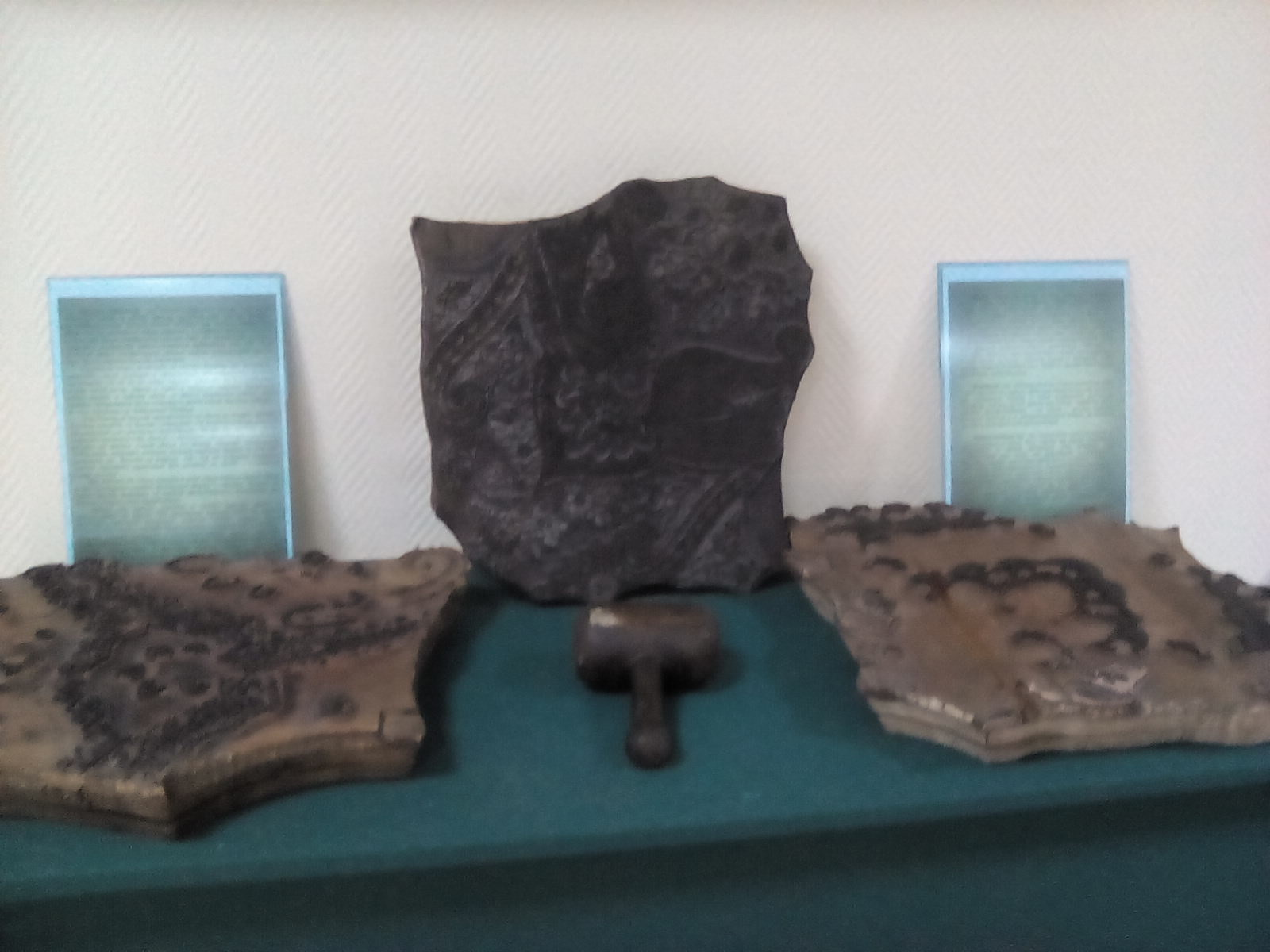 Деревянные резные формы и молоток, которые использовались для нанесения рисунка на павловопосадские платки до 1970-х годов